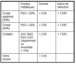 Composition du cristal